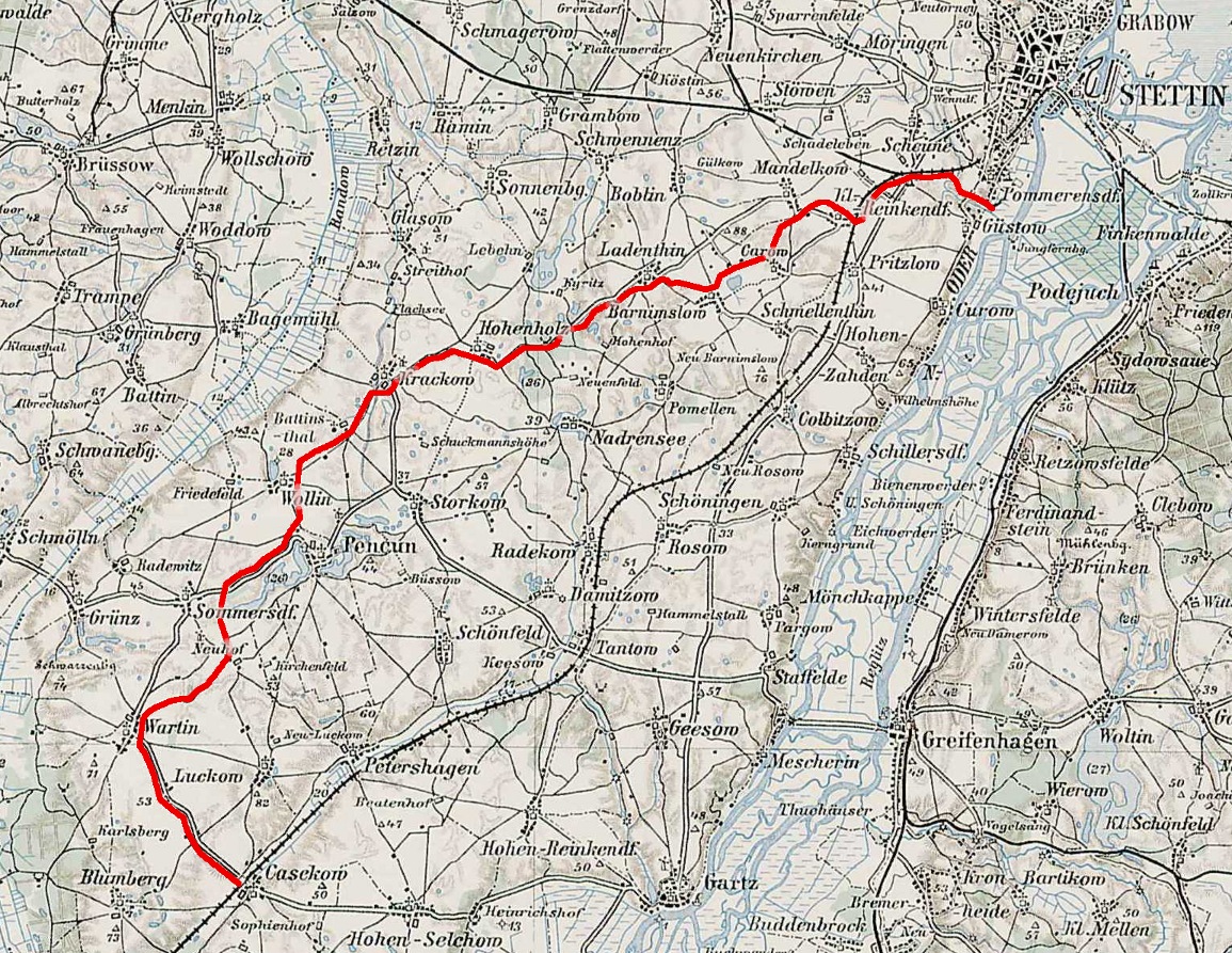 Karte der Kleinbahn Casekow–Penkun–Oder basierend auf der Blatt 32-53 der Generalkarte von Mitteleuropa 1:200.000 der Franzisco-Josephinischen Landesaufnahme File:Stettin - 32-53.jpg